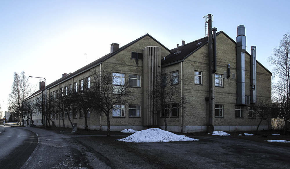 Tyrvään käsi- ja taideteollisuusoppilaitoksen päärakennus koillisesta